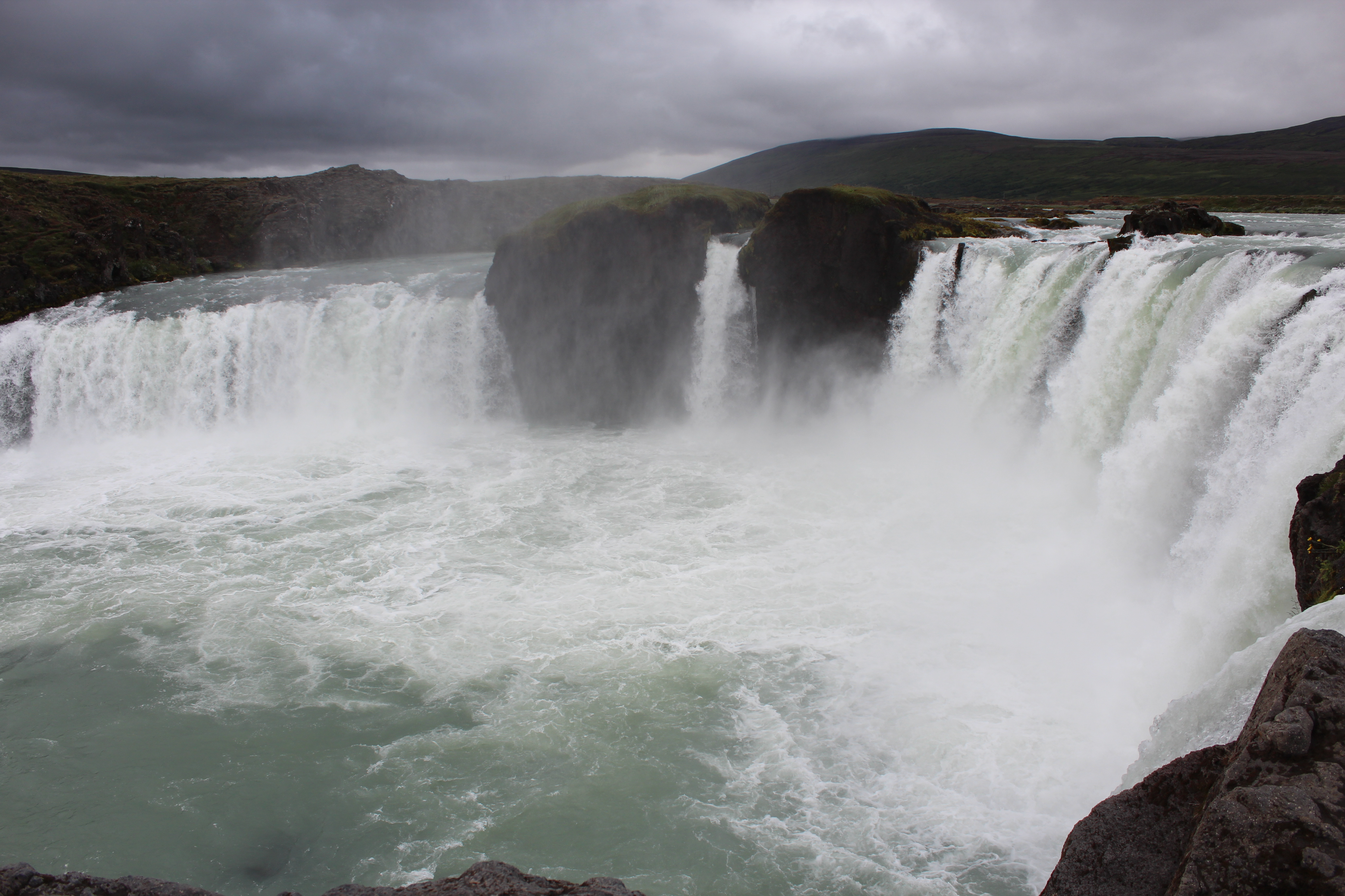 Goðafoss ("Gëtter-Waasserfall") an der Gemeng Þingeyjarsveit, an Island.